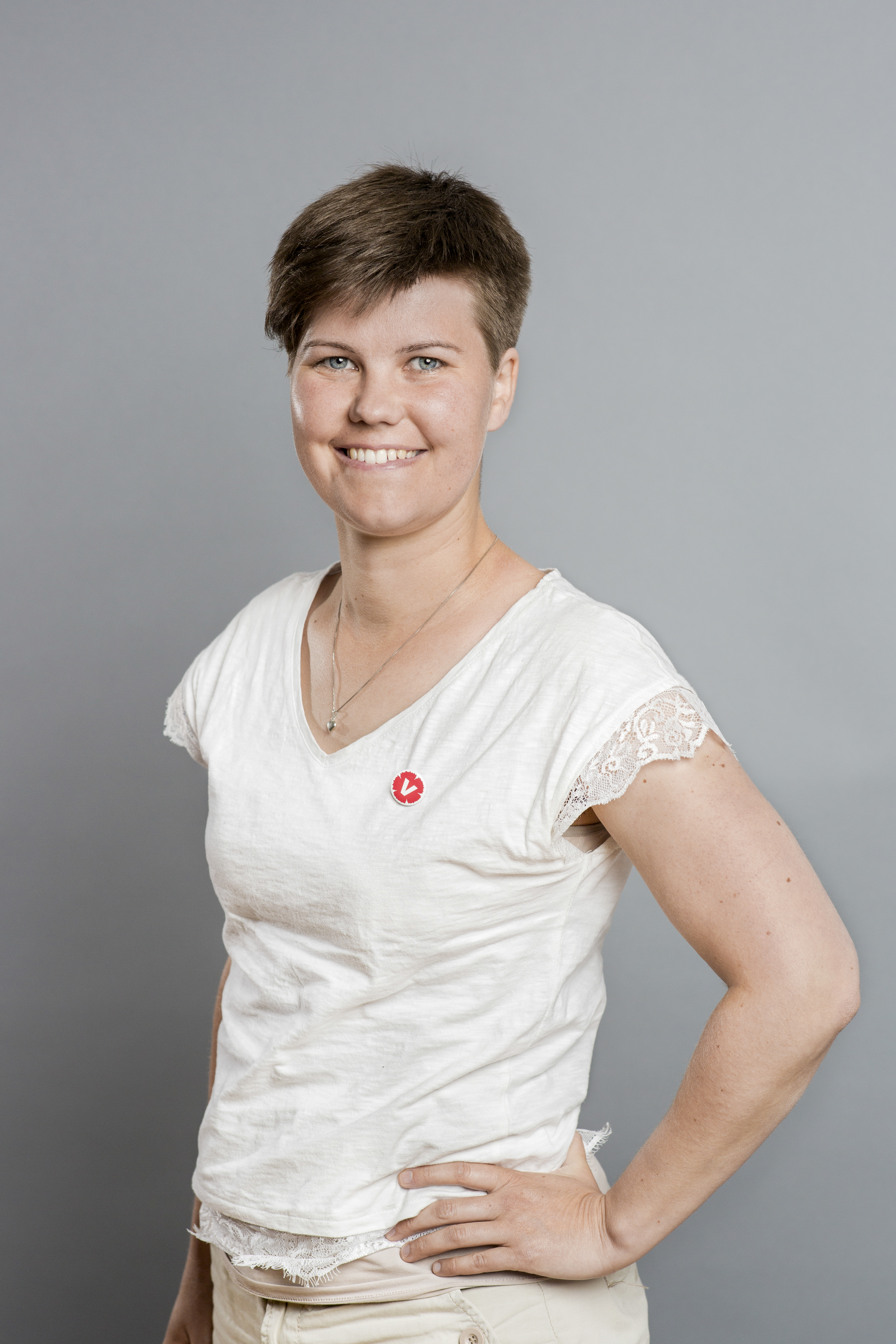 Hanna Gunnarsson, Vänsterpartiet, 2018.